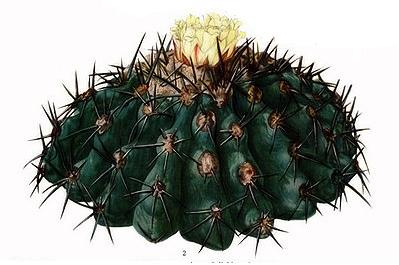 Copiapoa coquimbana